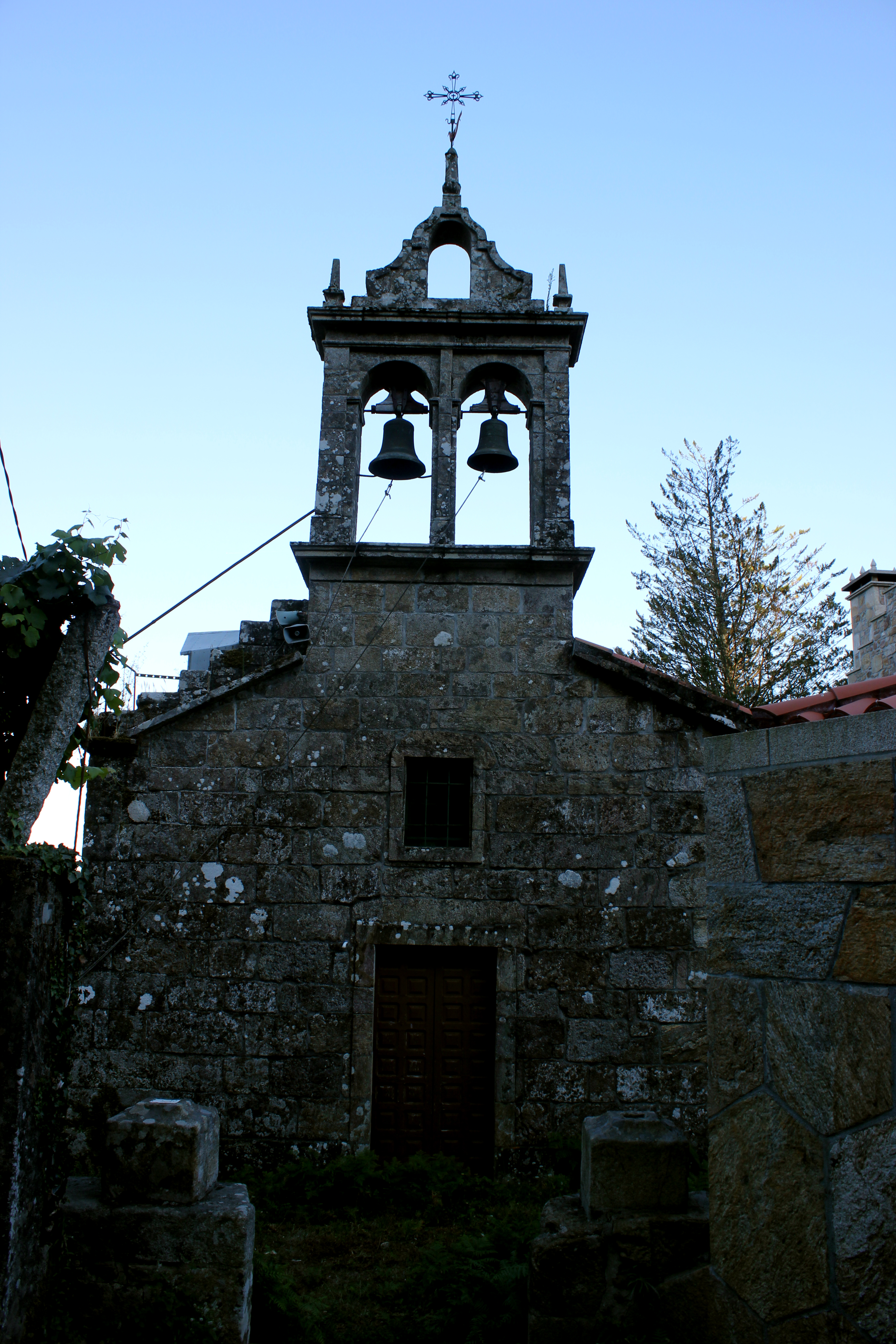 Igrexa de Barbude, A Estrada.